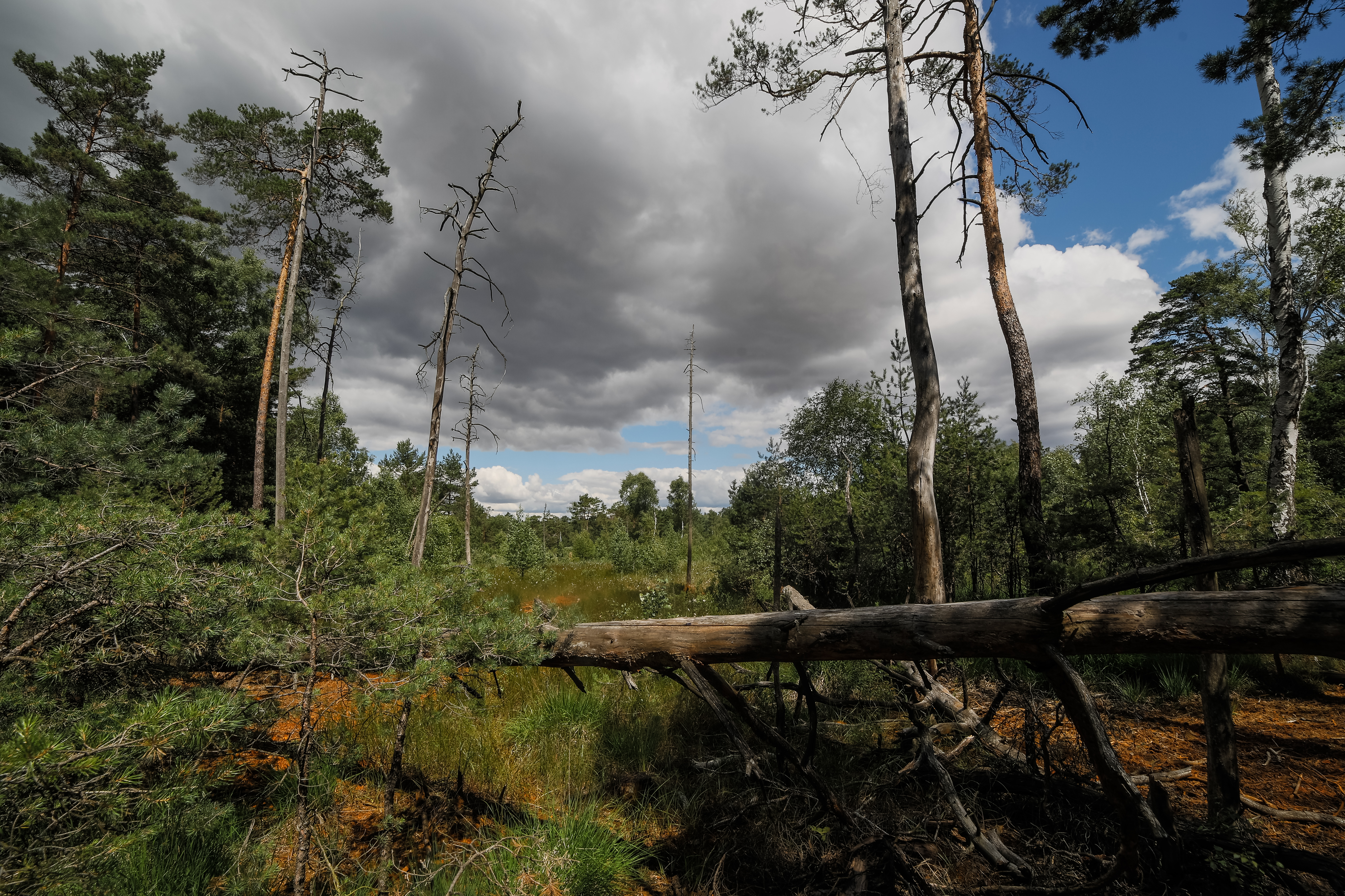 Durch den Braunkohlenbergbau beeinträchtigtes Moor, das durch Bewässerung erhalten wird. Die braunen Ablagerungen sind Eisenhydroxid aus dem Bewässerungswasser.